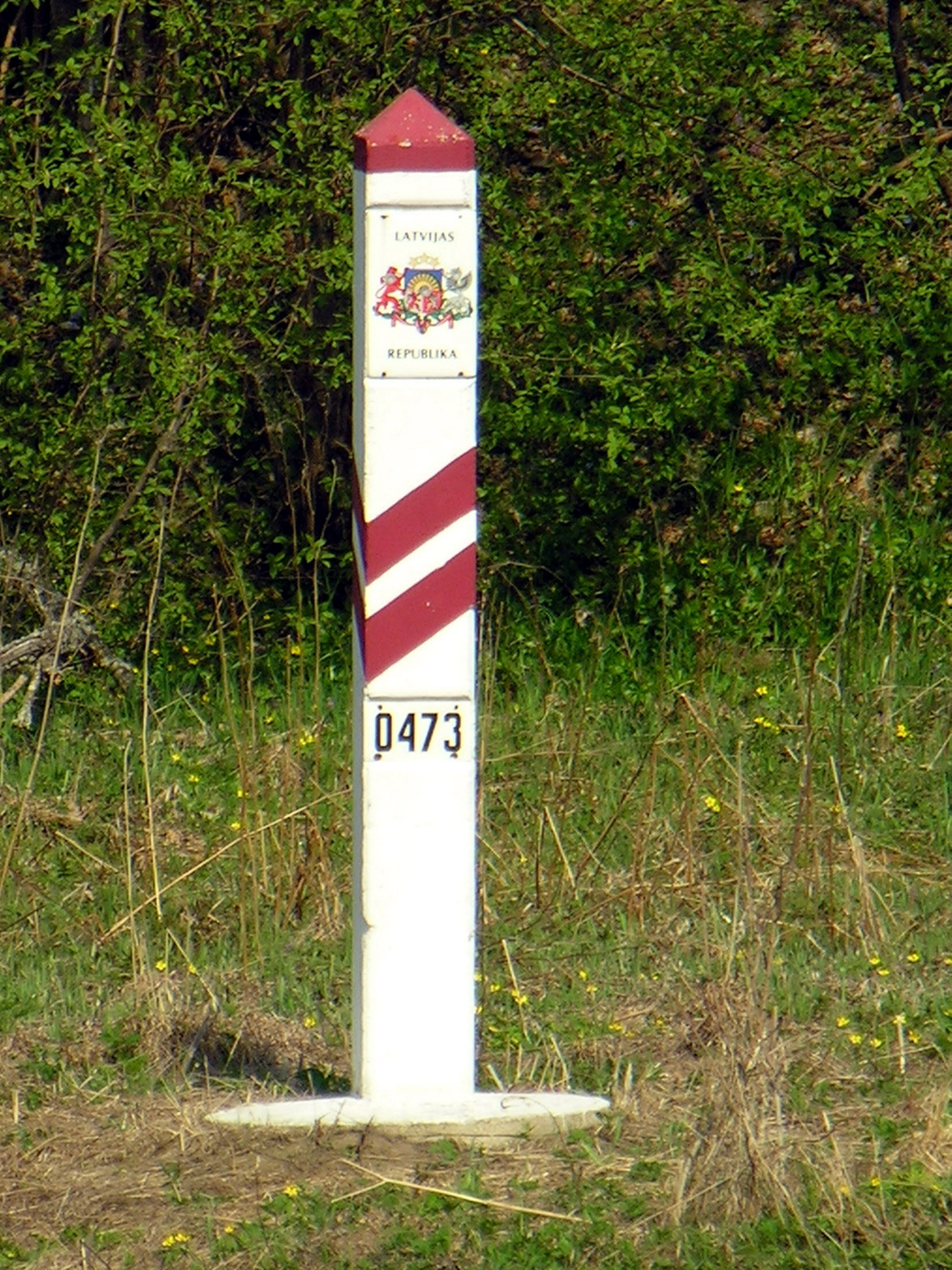 Lietuvos-Latvijos valstybės siena: Latvijos riboženklis 2006 m. gegužės 5 d., Lietuva